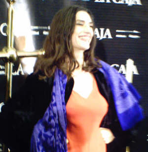 Ángela Molina